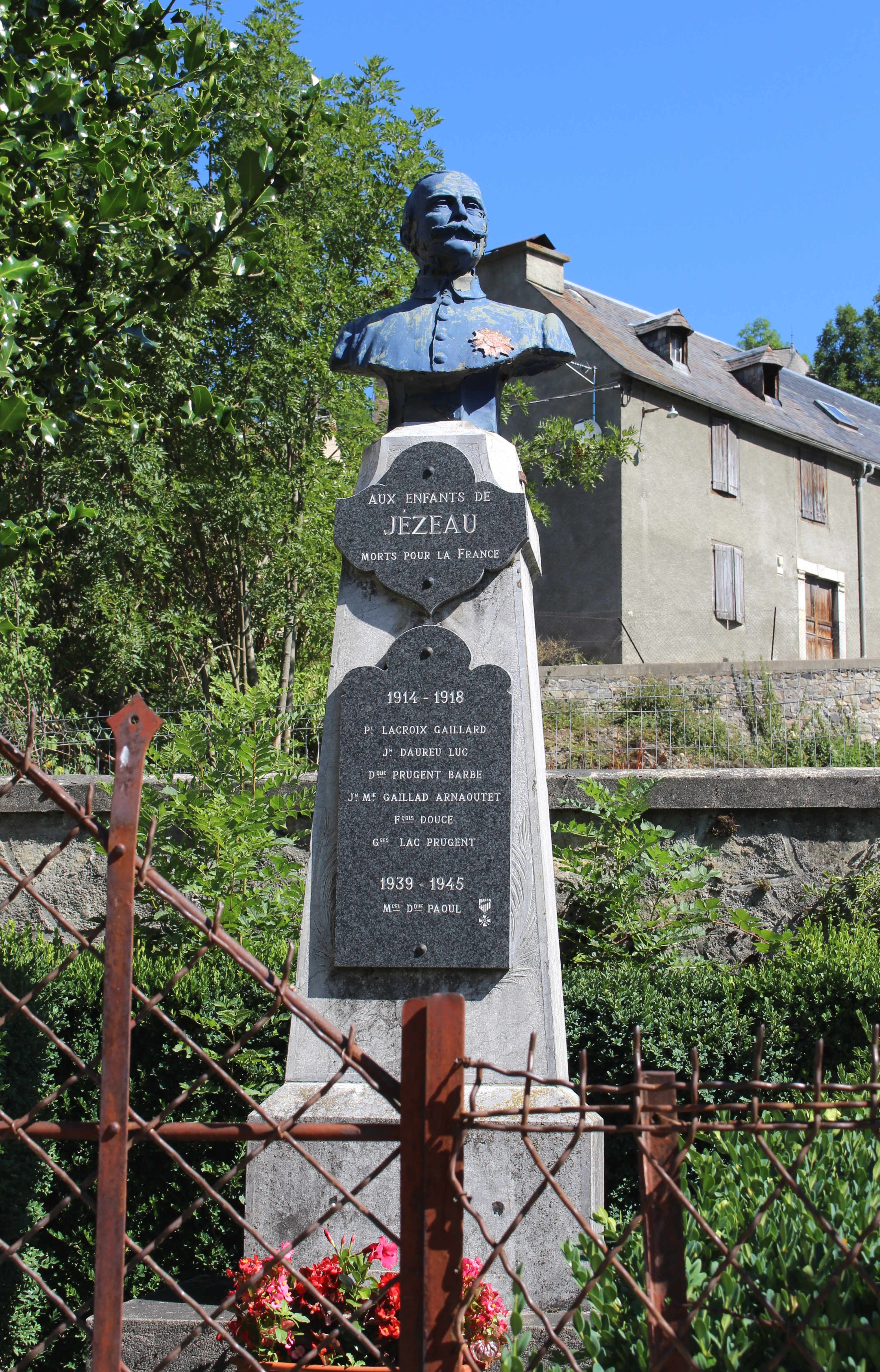 Monument aux morts de Jézeau (Hautes-Pyrénées)